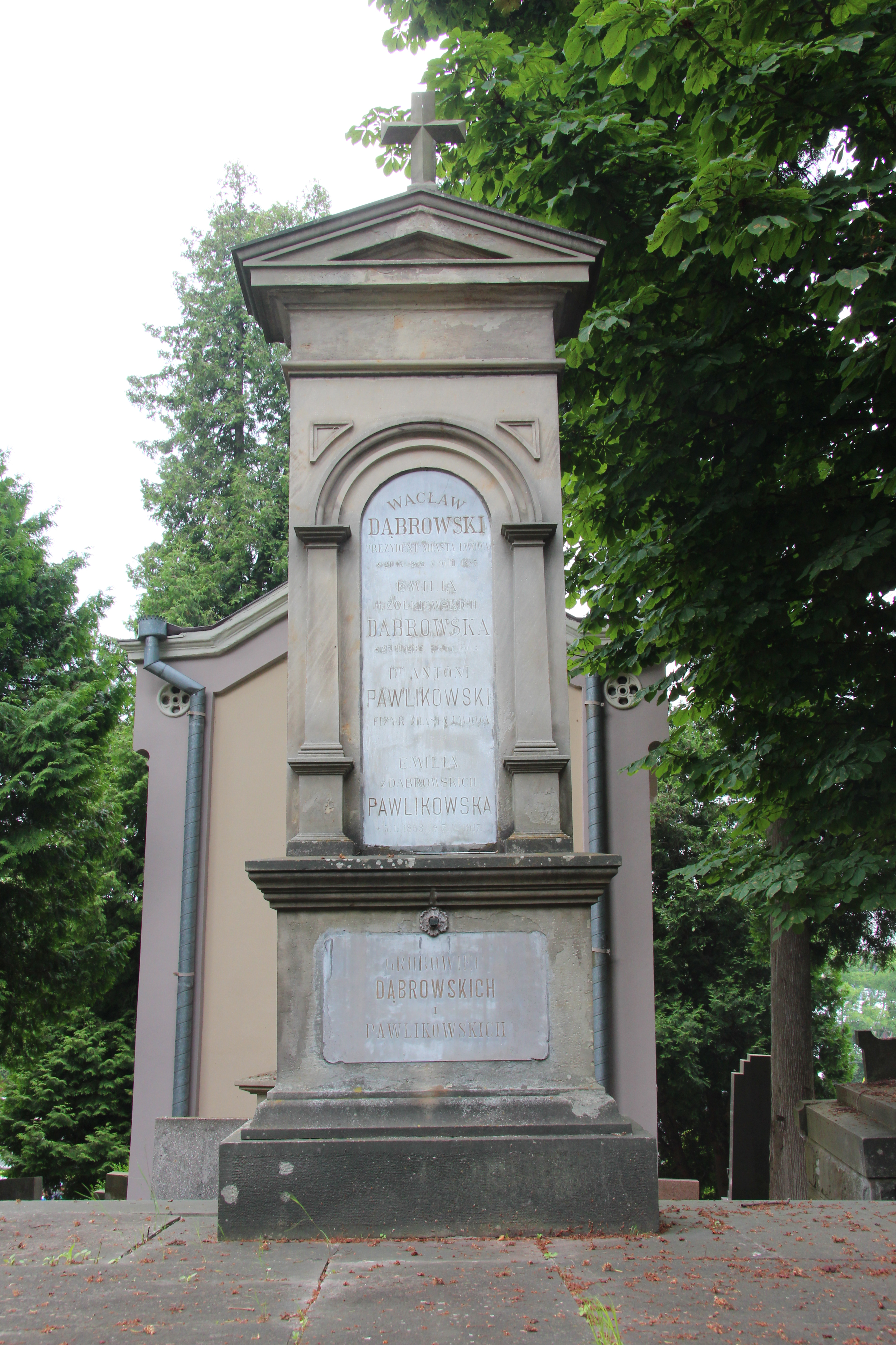 Гробівець родини Домбровських. Личаківський цвинтар , поле № 2.